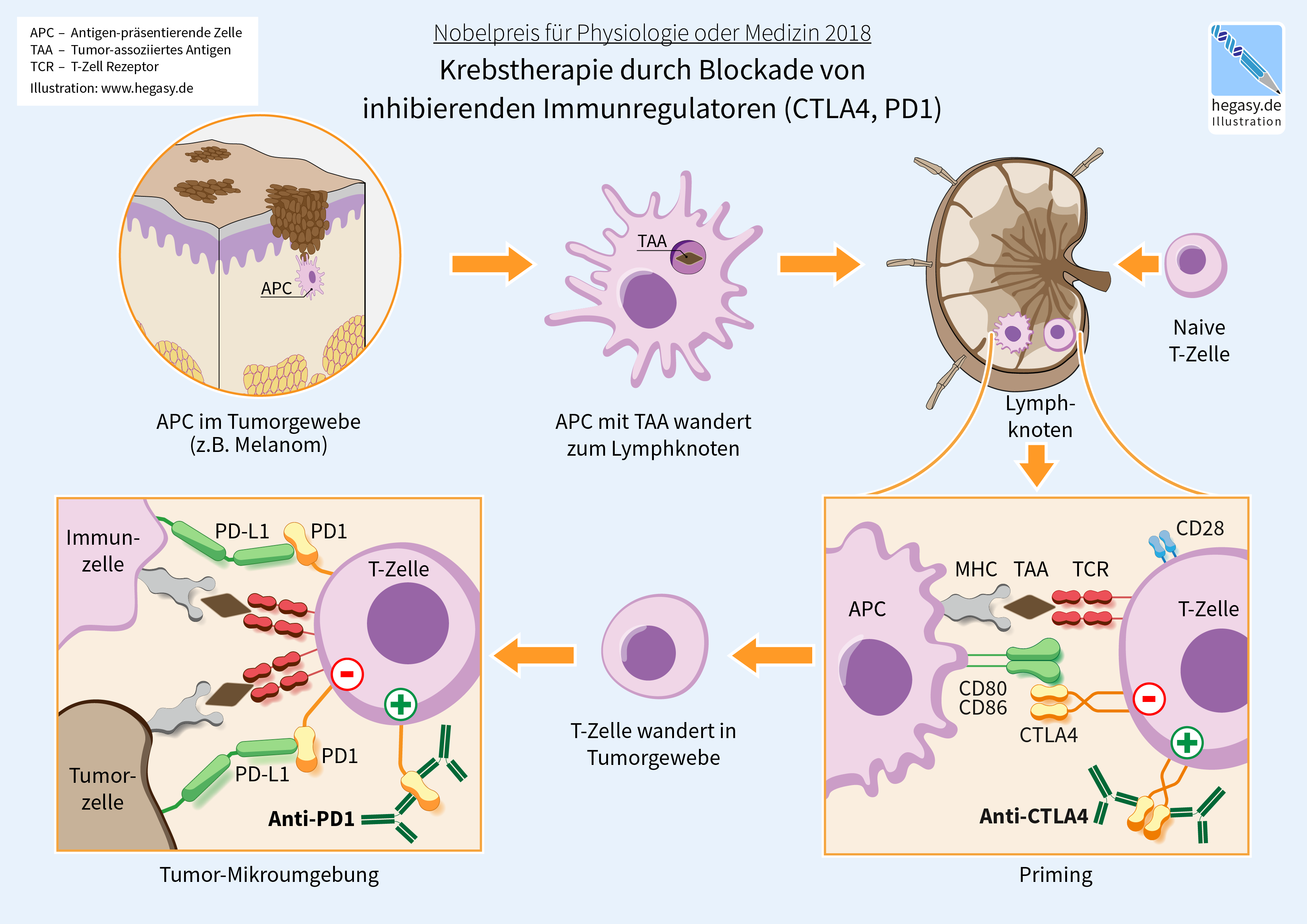 Tumor Immunologie, Immune Checkpoints, Immuntherapie, Tumor, CTLA-4, PD-1, PD-L1, Lymphknoten, Antikörper, CD80, CD86, CD28, TCR, Tumorassoziierte Antigene, Mikroumgebung, TAA, MHC, Anti-PD1, Anti-CTLA4